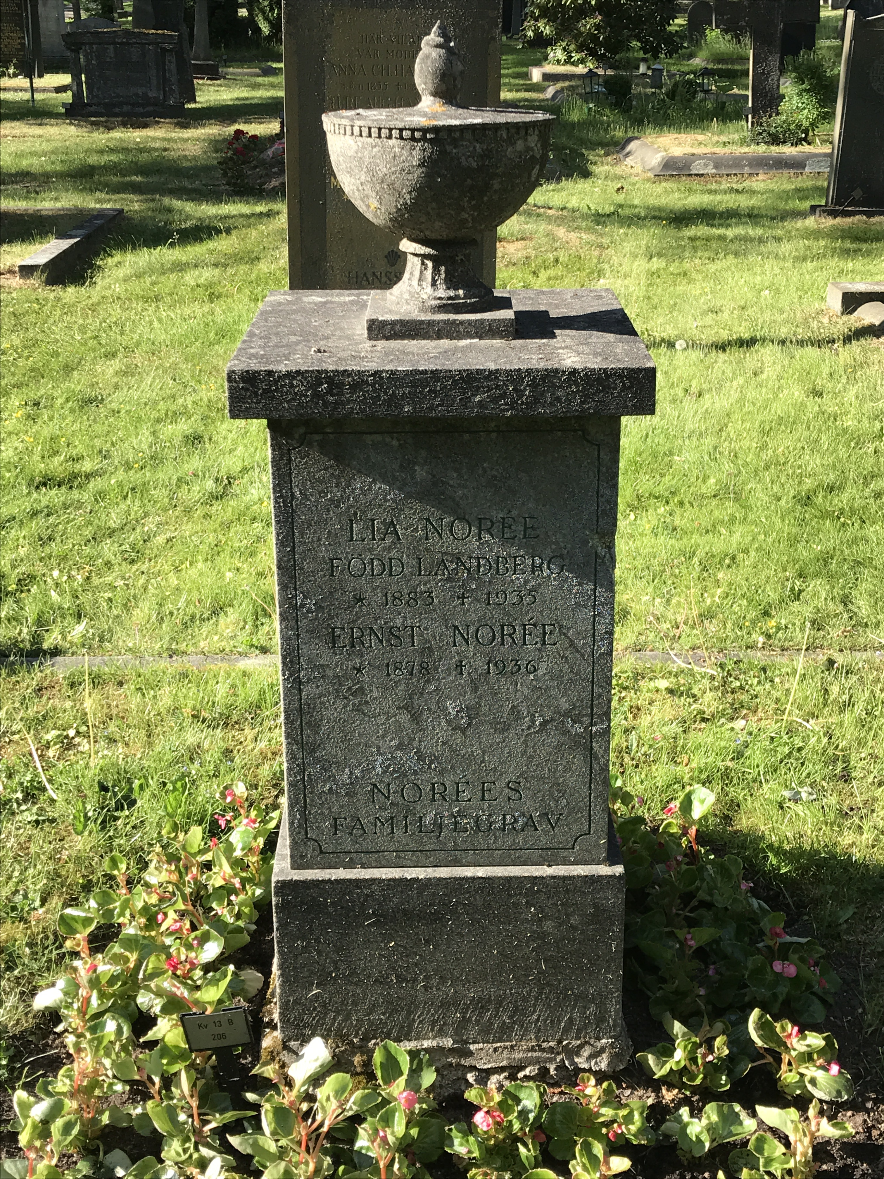 Kv 13 B 206